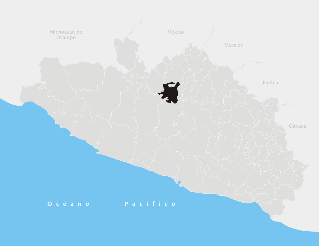 Apaxtla en el estado de Guerrero (México)